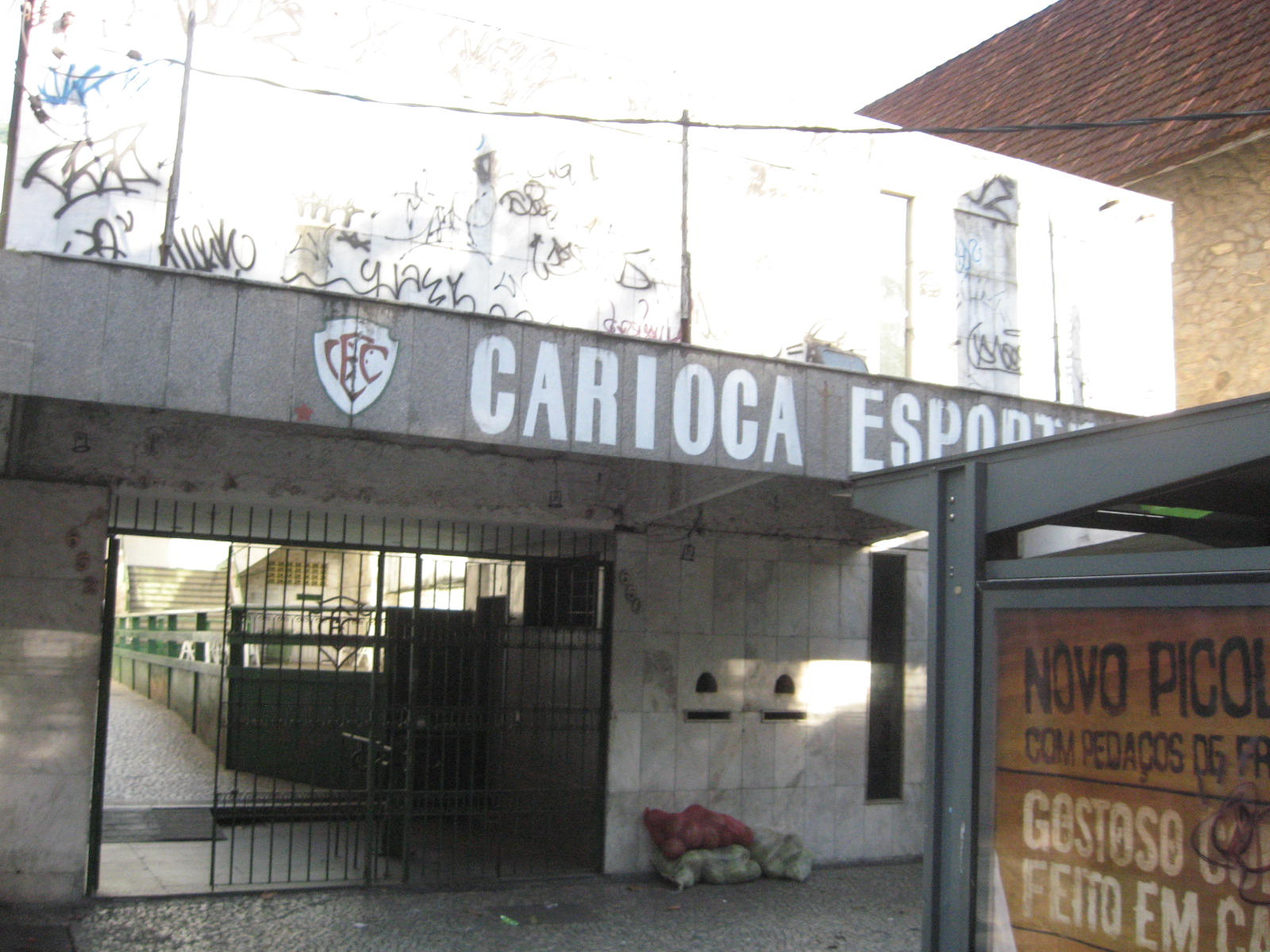 Sede do Carioca Esporte Clube, localizado no bairro do Jardim Botânico, cidade do Rio de Janeiro, RJ.